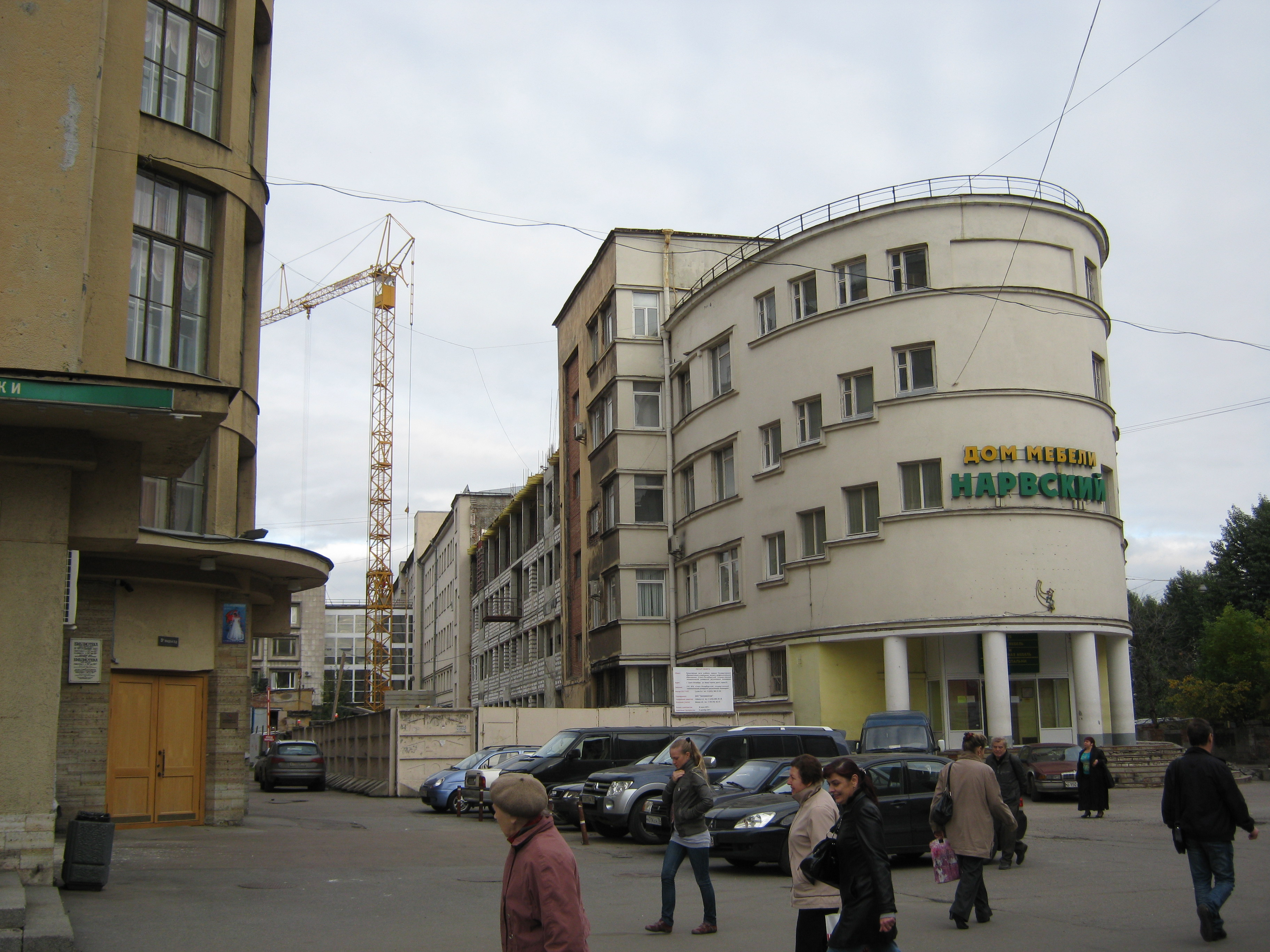 На фото запечатлено восстановление разрушенной части так называемого "Дома технической учебы" по адресу Санкт-Петербург, ул. Ивана Черных, д. 4. Здание является вновь выявленным объектом культурного наследия. Стиль - конструктивизм.